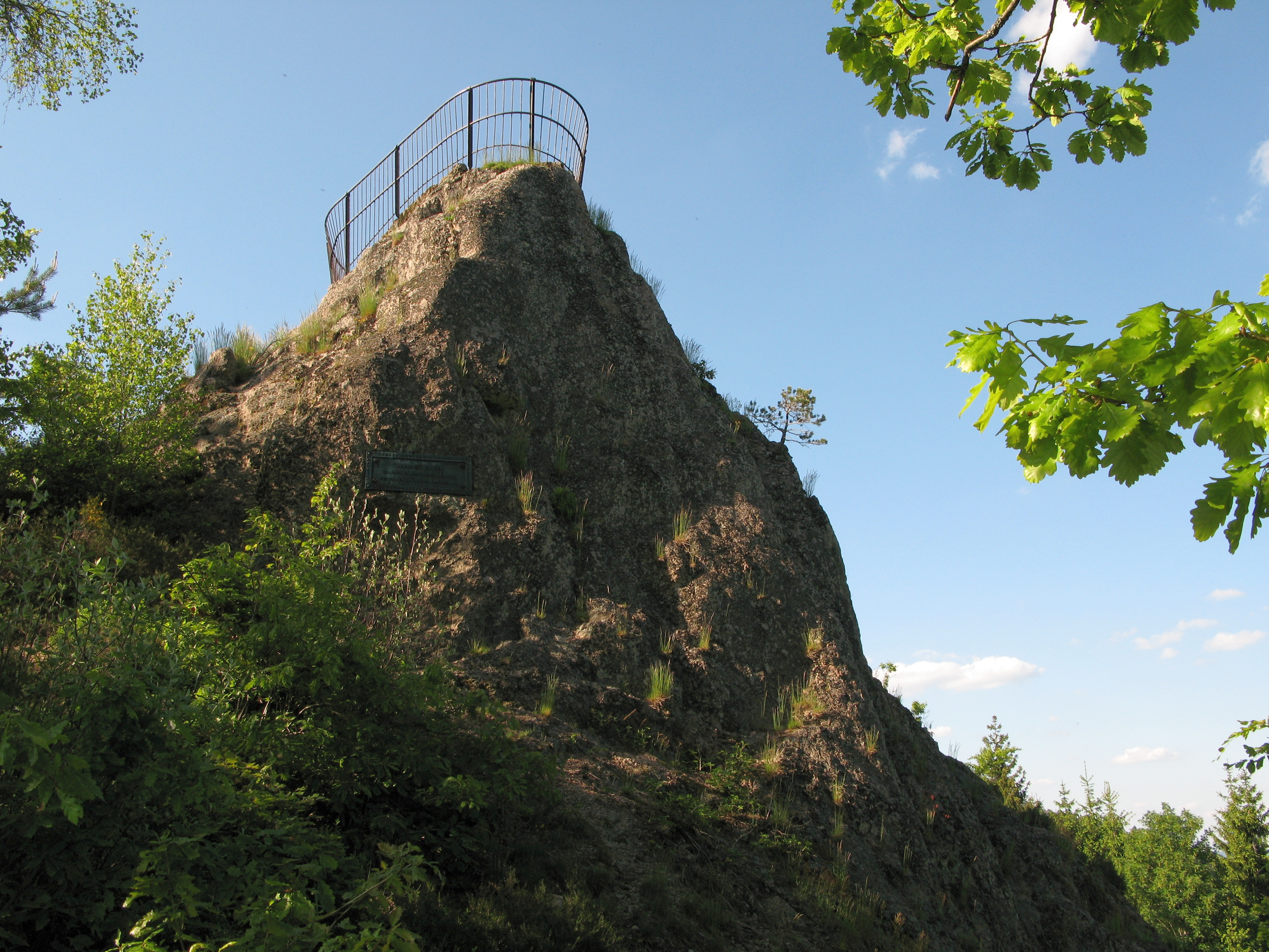 Der Huberfelsen am Westweg und am Zweitälersteig bei Oberprechtal im Schwarzwald.